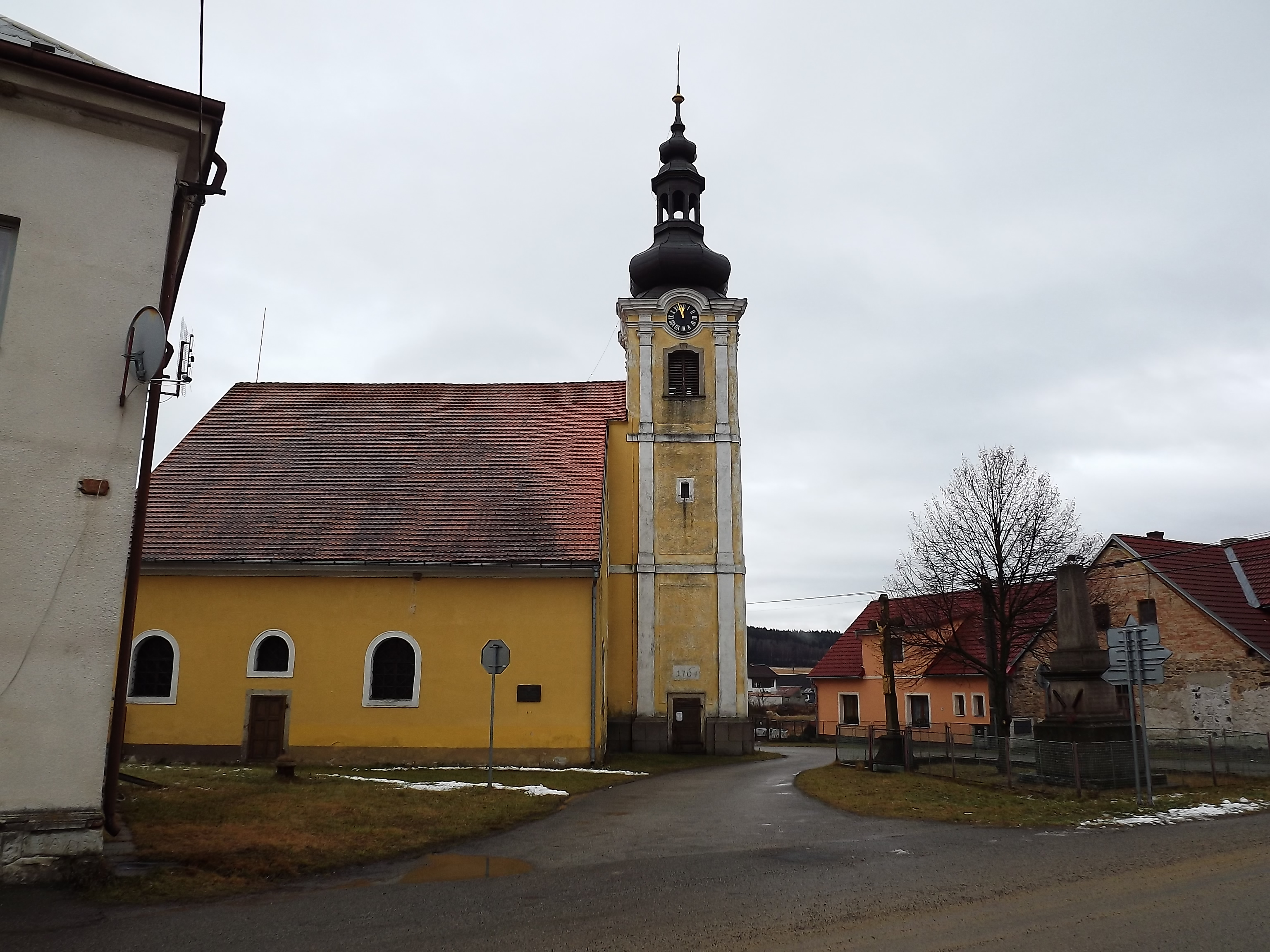 Kostel a pomníky v Číměři